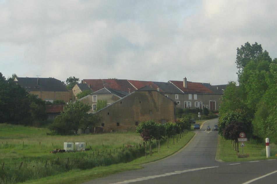 Mairy